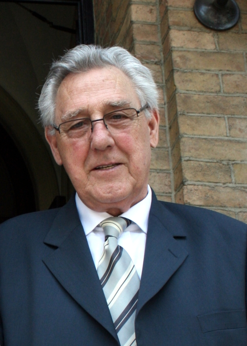 Svečano proglašenje i predstavljanje novih članova Hrvatske akademije znanosti i umjetnosti u Zagrebu, Milan Moguš